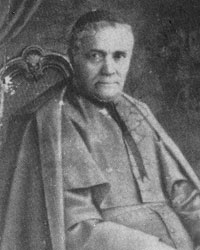 Il Cardinale Panebianco